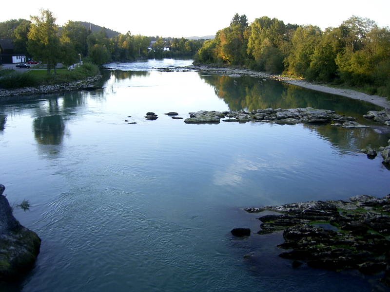 Der Lech in Lechbruck, flußabwärts von der Brücke fotografiert